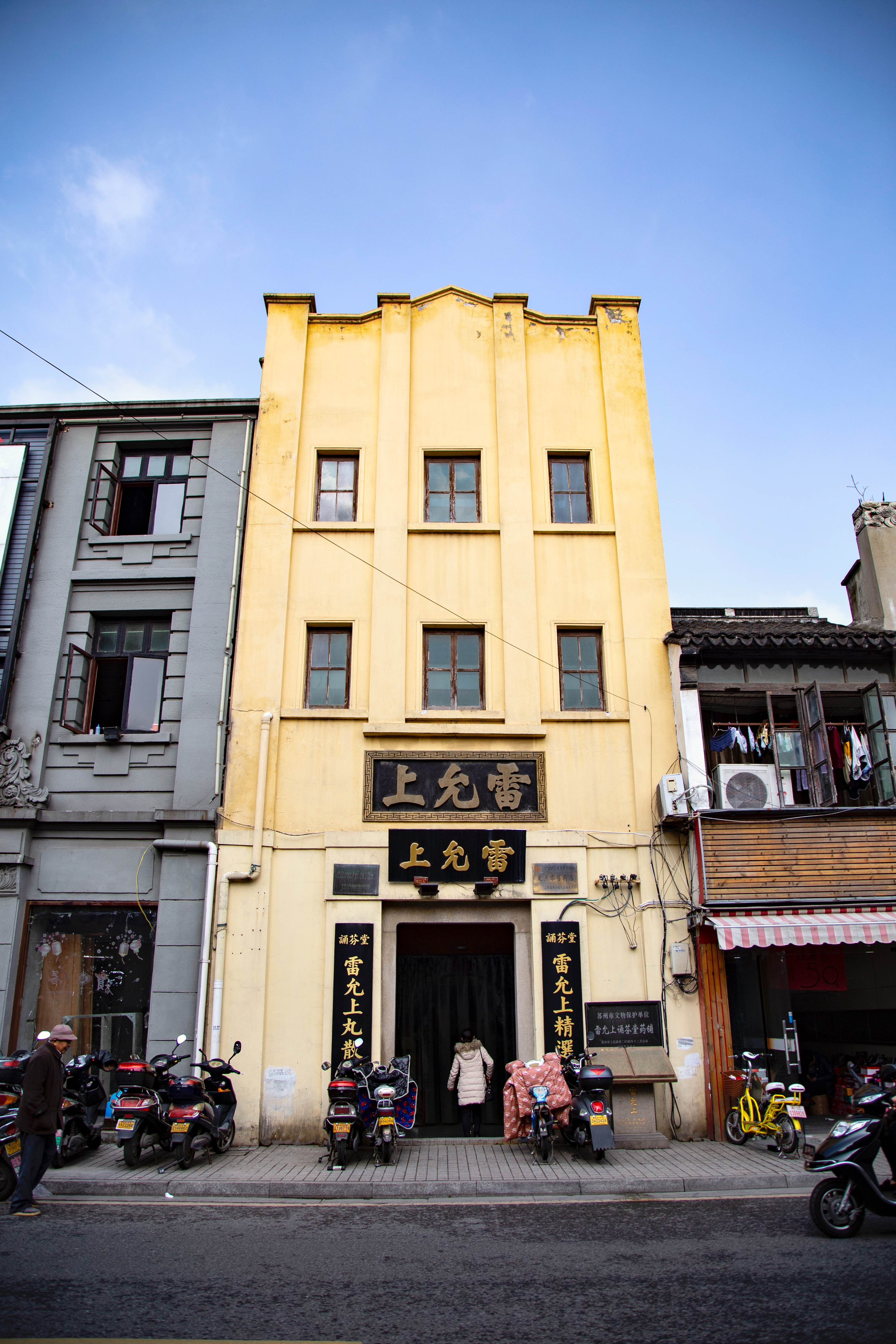 中文（中国大陆）: 雷允上诵芬堂药铺